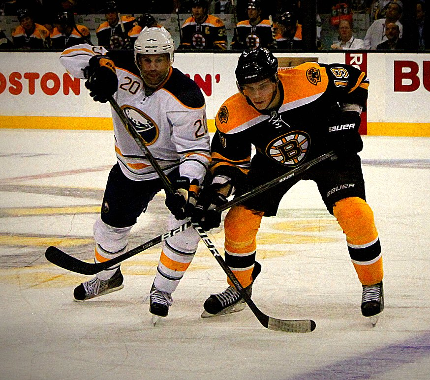 & Rob Niedermayer